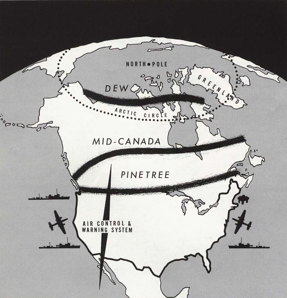 DEW line map